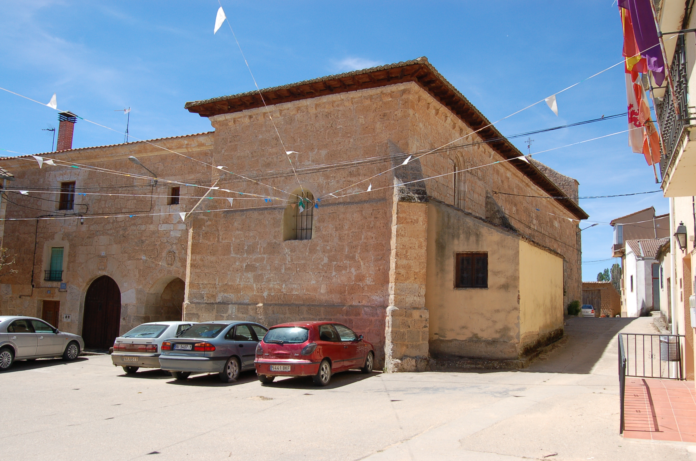 Igrexa de Boada de Roa